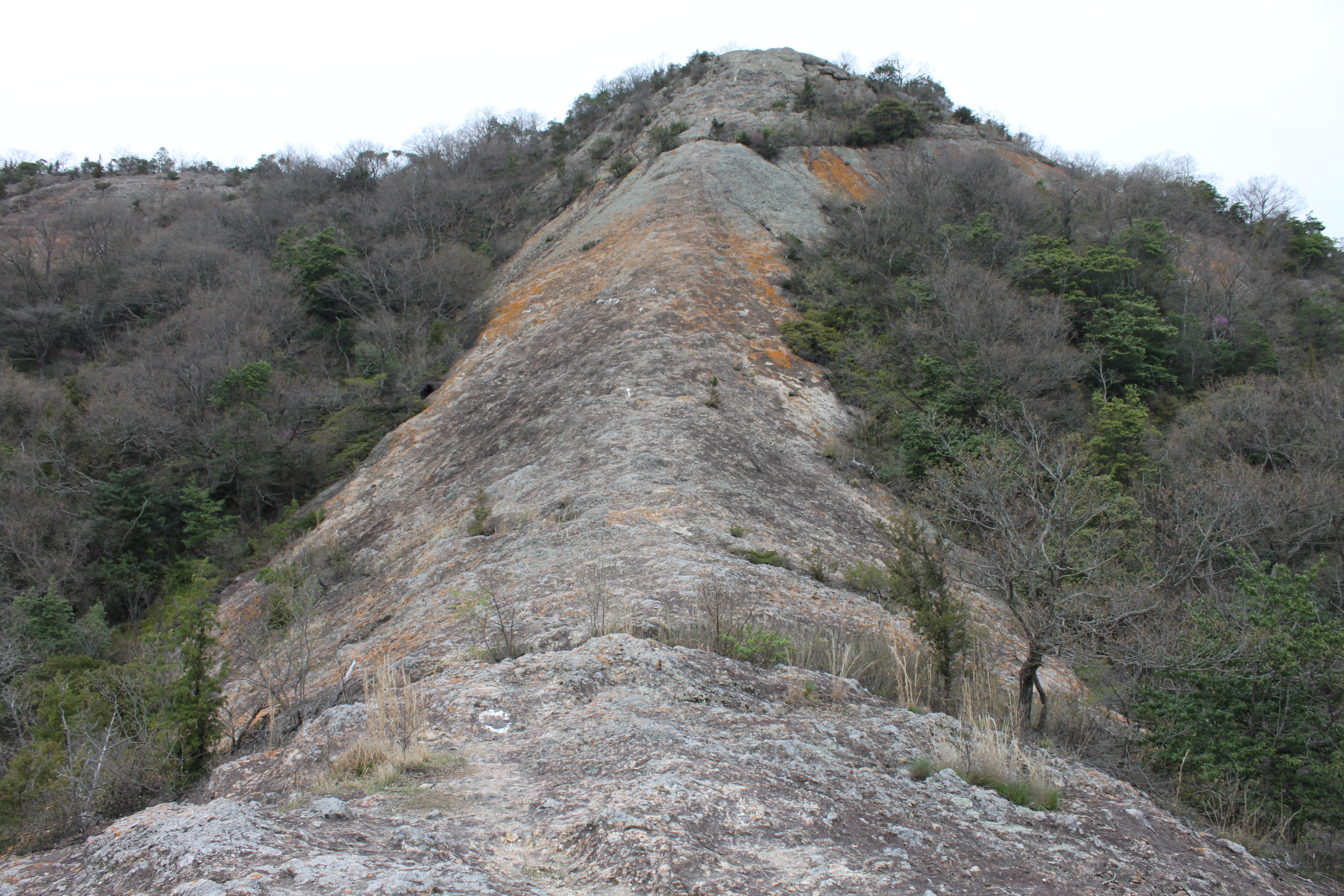 小野アルプスの紅山を南から望む。兵庫県小野市と加古川市との境界にある。